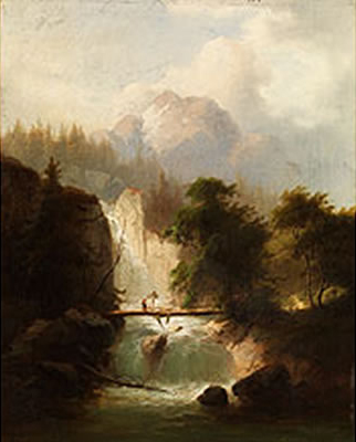 Wasserfall mit Holzbrücke im Gebirge